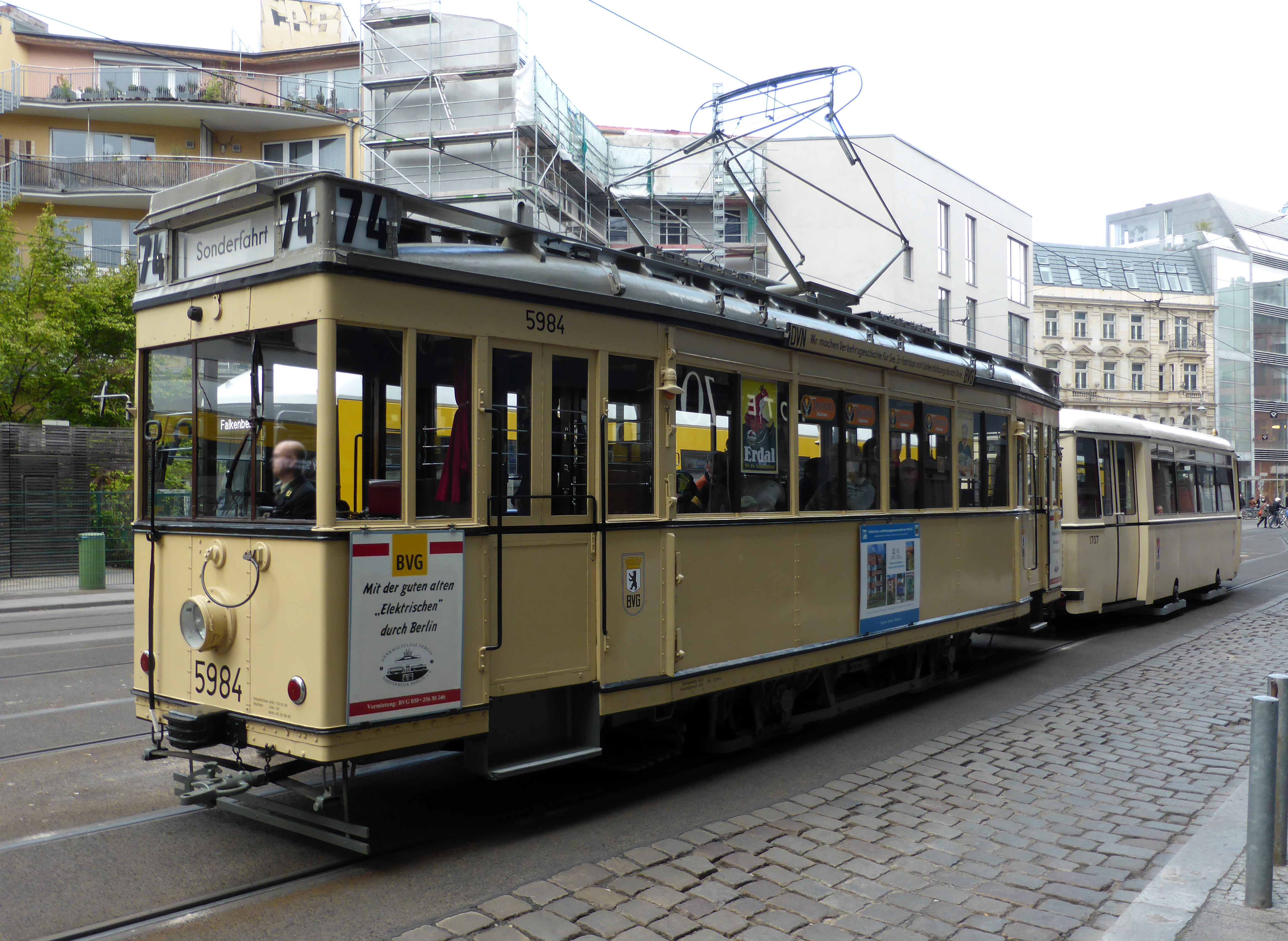 Historische Straßenbahn Berlin.